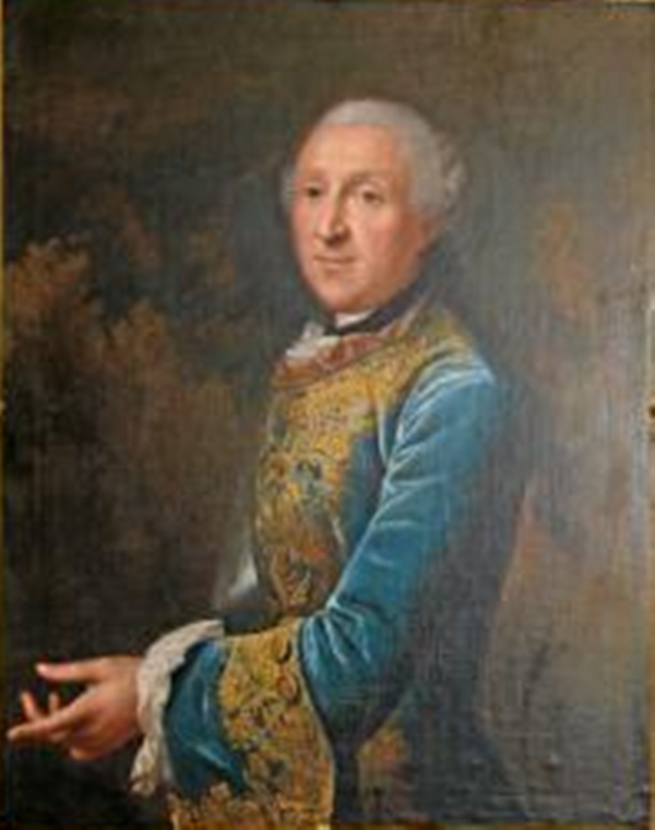 Porträt des Johann Conrad Firnhaber von Eberstein (* 22. September 1776 in Rüsselsheim; † 4. Juni 1849), hessischer Politiker und ehemaliger Abgeordneter der 2. Kammer der Landstände des Großherzogtums Hessen.